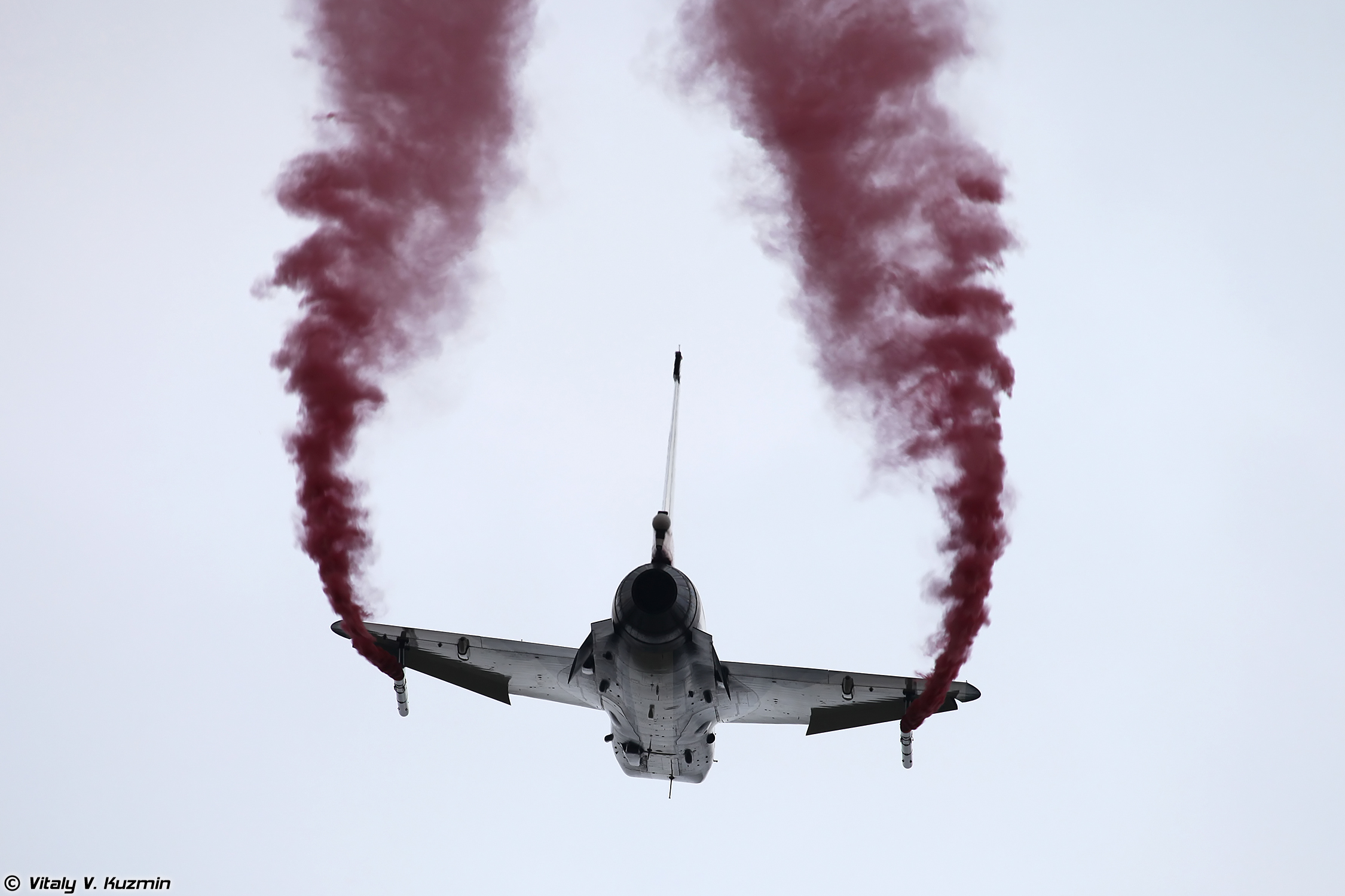 Пилотажная группа 1 августа ВВС НОАК (PLAAF Aerobatic team August 1st)